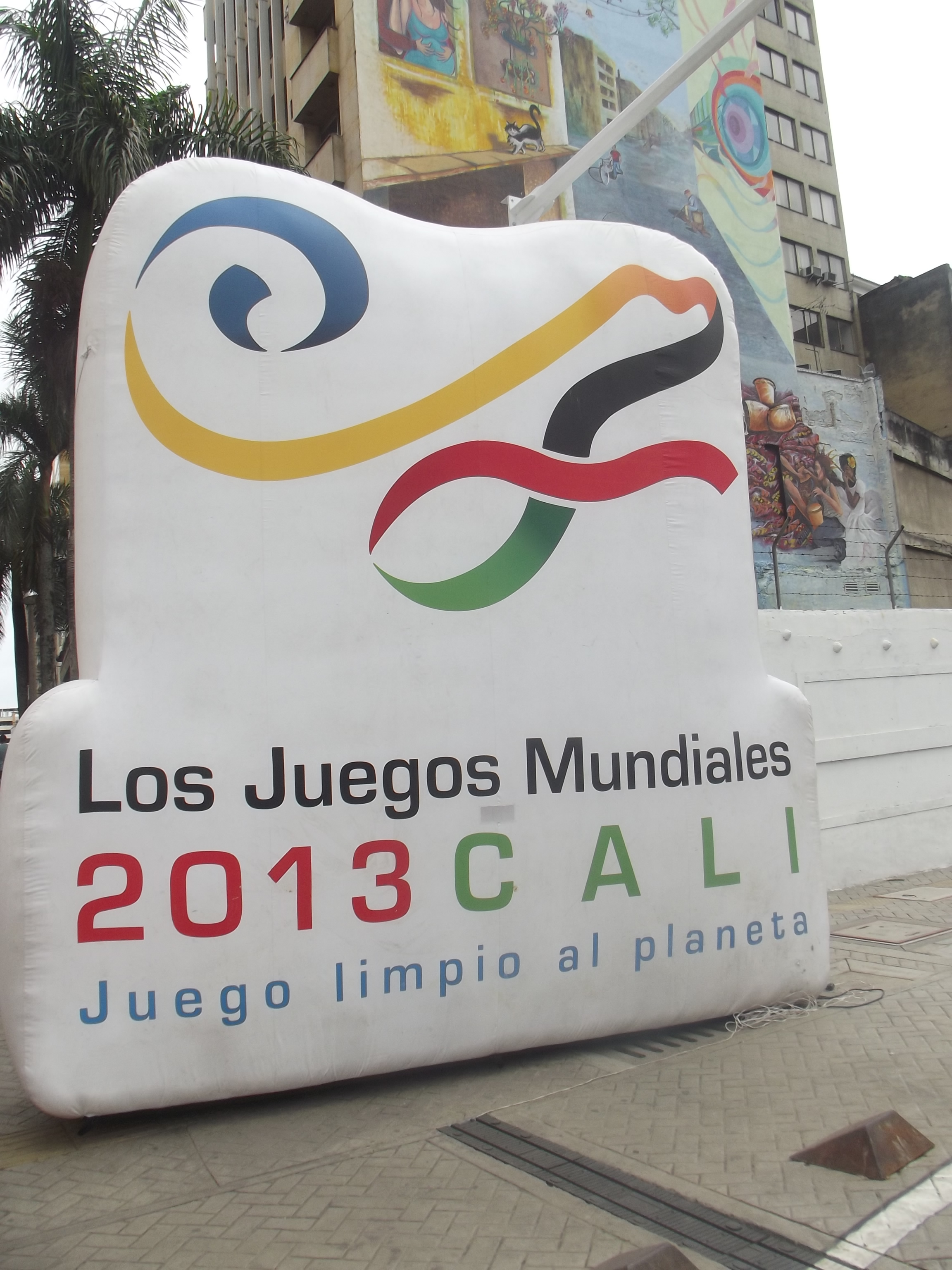 Los juegos mundiales en la avenida Colombia luego de su hundimiento